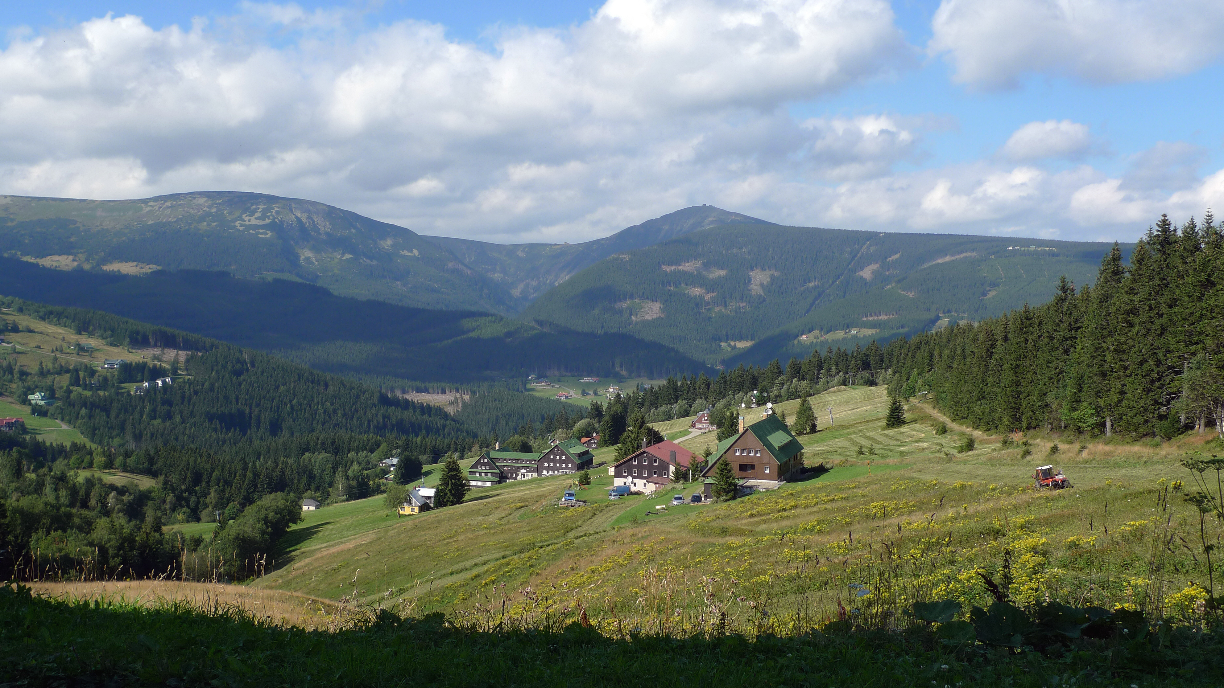 Sněžka, svah na Muldě, Pec pod Sněžkou